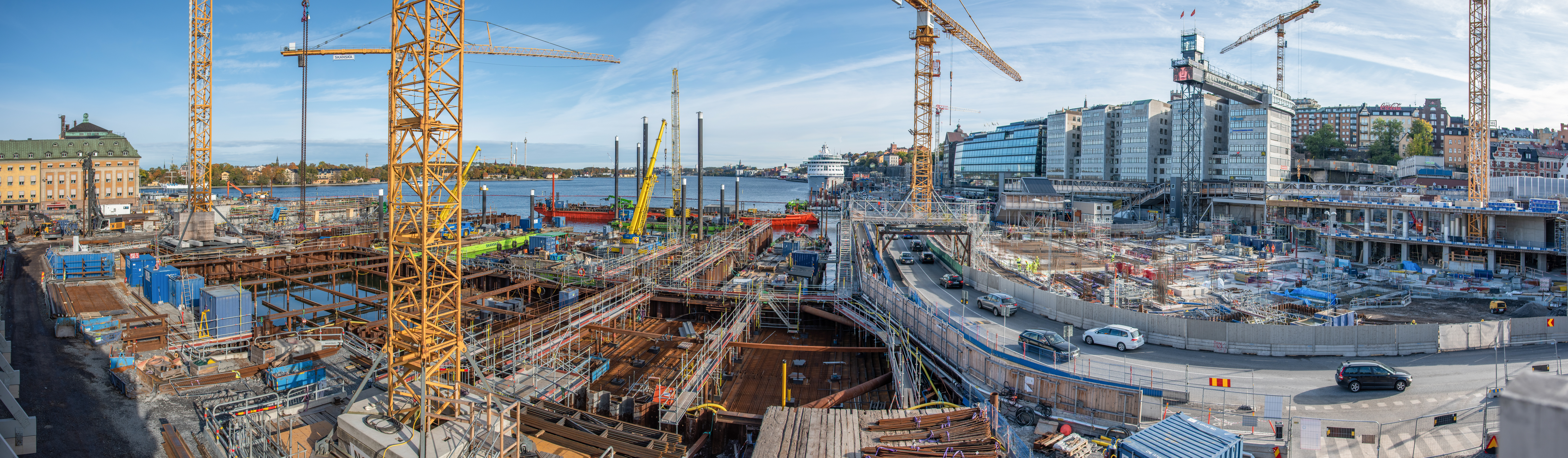 Slussen, Stockholm, Sweden, October 2019